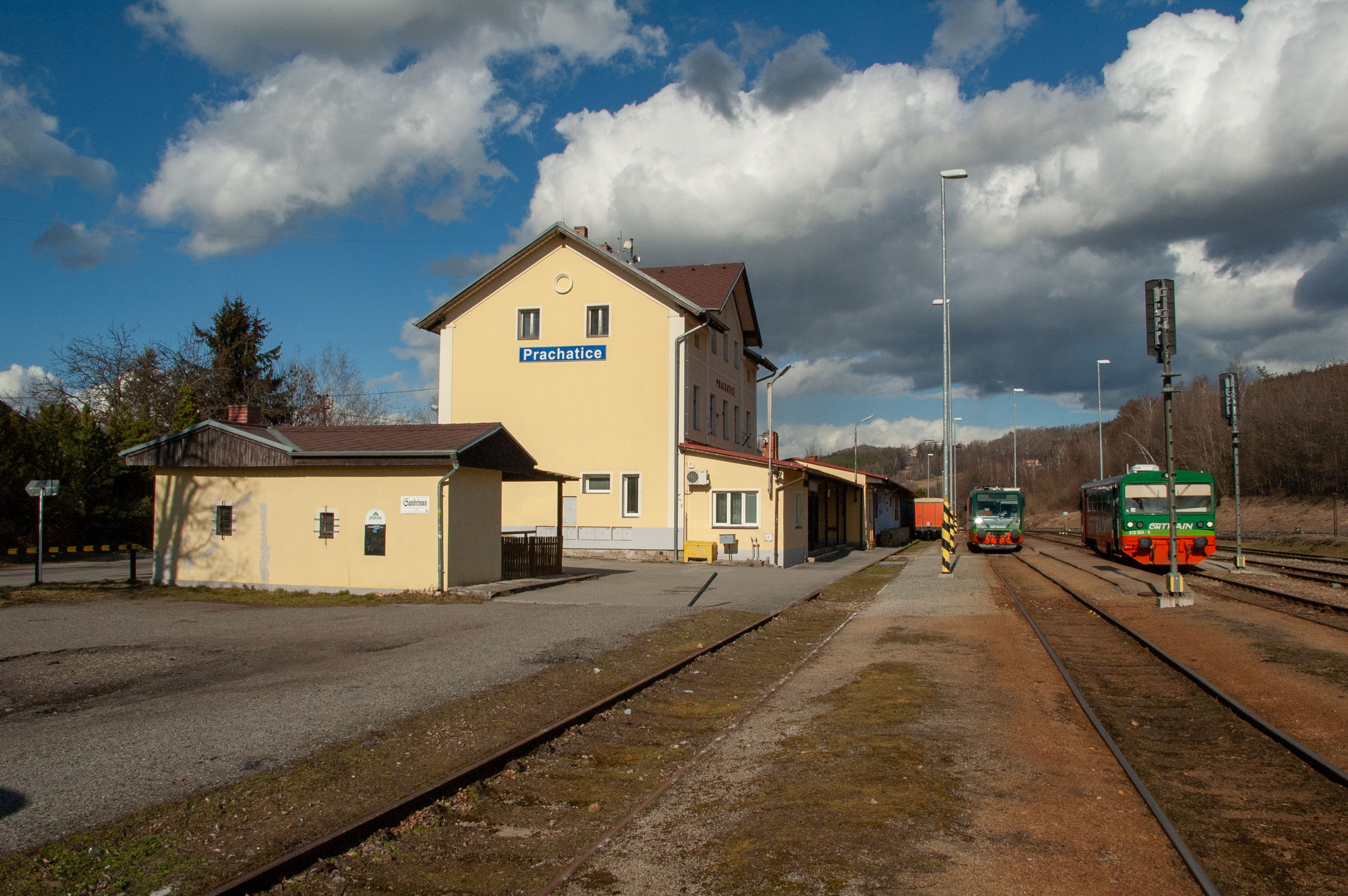 Nádraží Prachatice